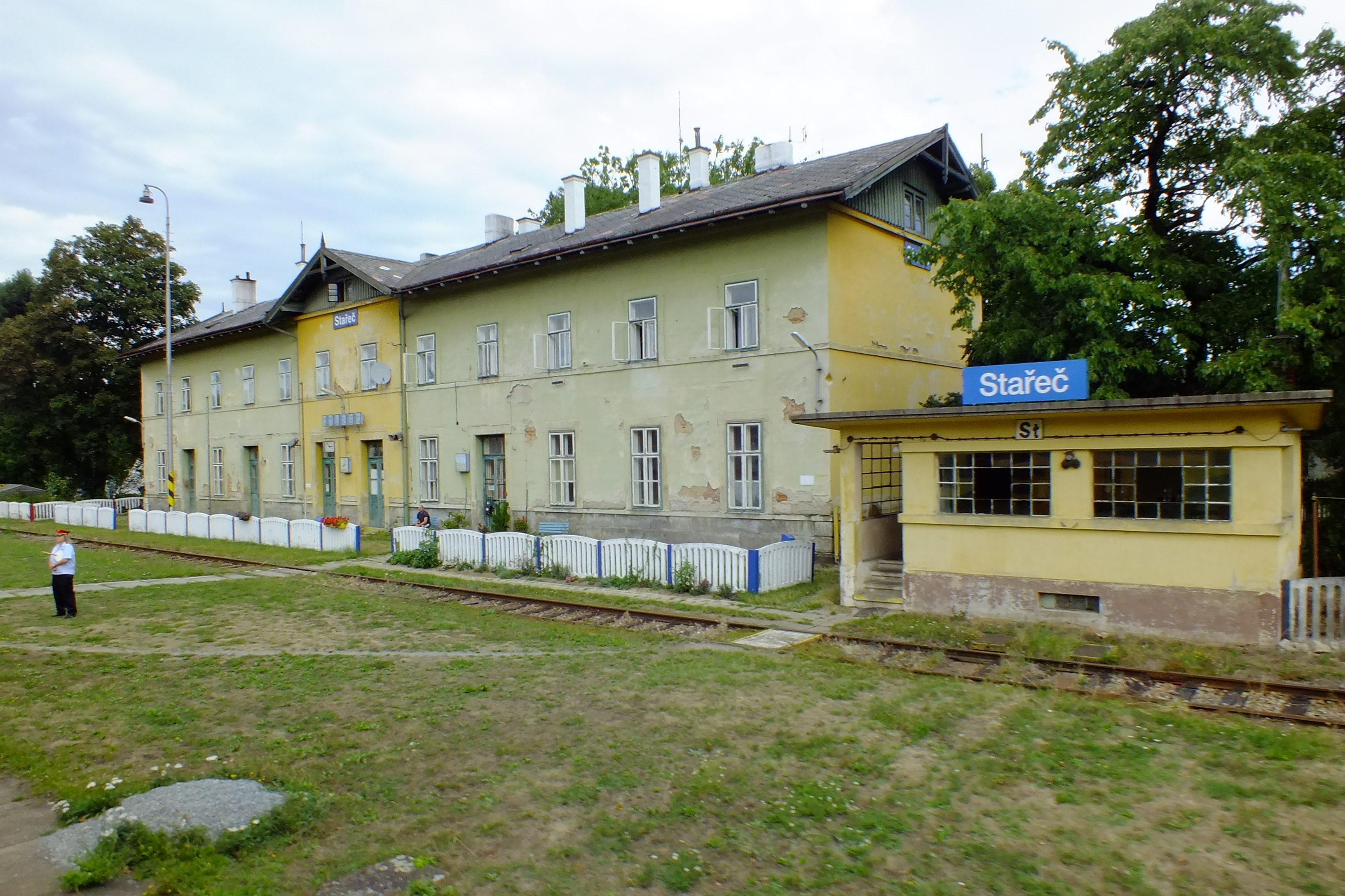 Staniční budova